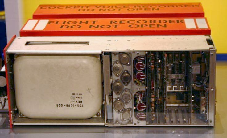 Caja negra. Flight recorder ("black box" of aeroplane) 8th October, 2005, Stockman department store, Heureka exhibition, Helsinki, Finland, Canon EOS 350D, EFS 18-55 mm Olli-Jukka Paloneva